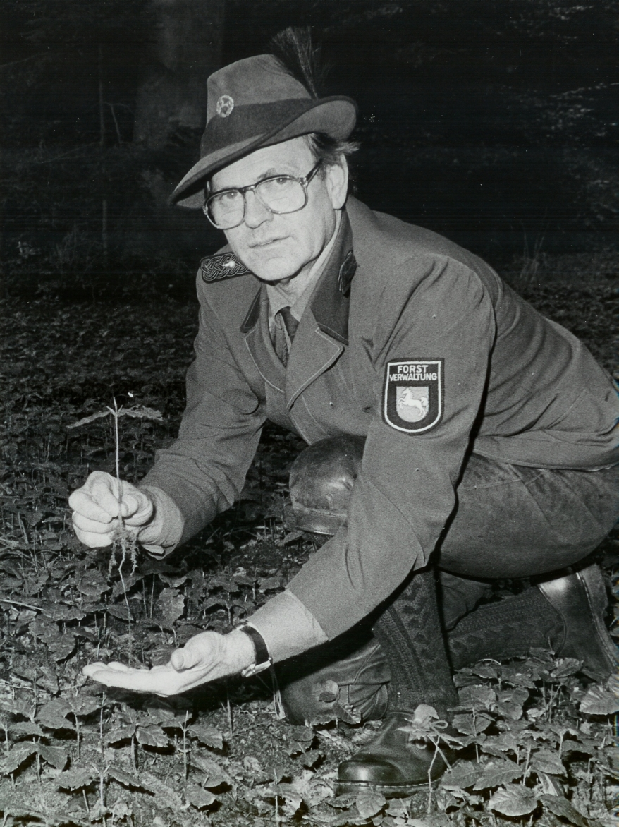 Revierförster der Landesforstverwaltung Niedersachsen, Forstamtmann Eilert Tantzen (deutscher Forstmann, Politiker und Heimatforscher), zeigt bei einem Waldgang in der Revierförsterei Hatten (Abteilung 220 b2) im Oktober 1984 von ihm vorbereitete Buchen-Naturverjüngung.